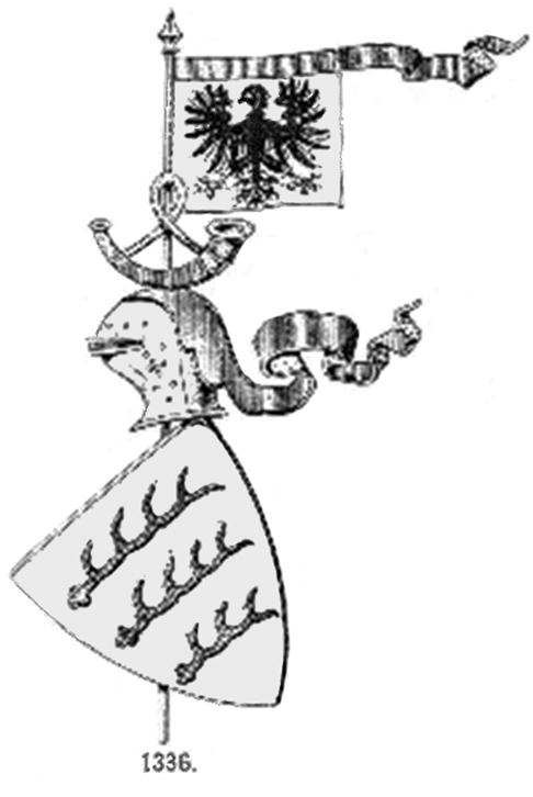 Württembergisches Wappen mit Horn und Reichssturmfahne (verliehen 1336)